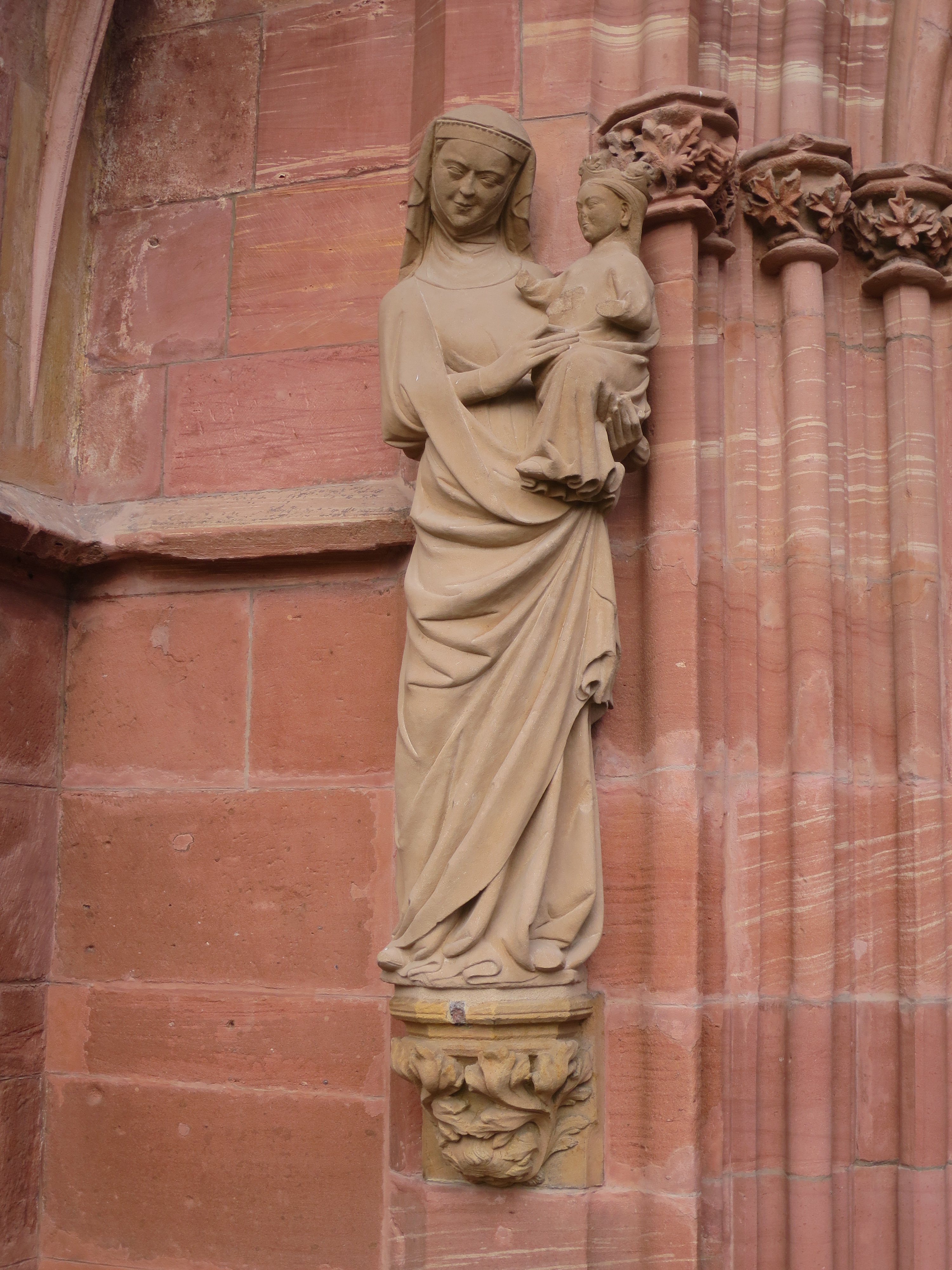 Liebfrauenkirche Worms, Südportal links, Marienfigur mit Jesuskind